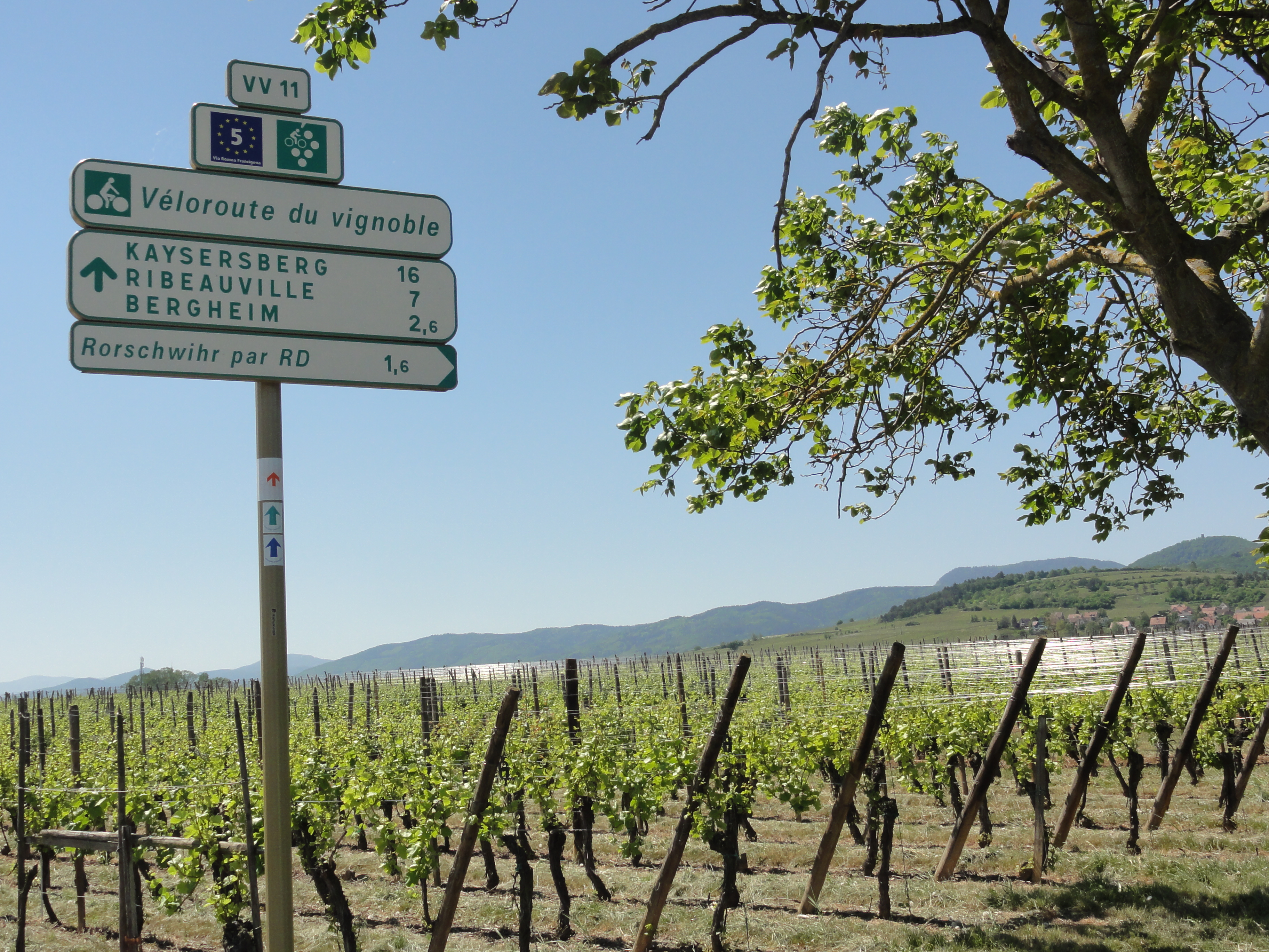 Rorschwihr (Bas-Rhin) véloroute du vignoble